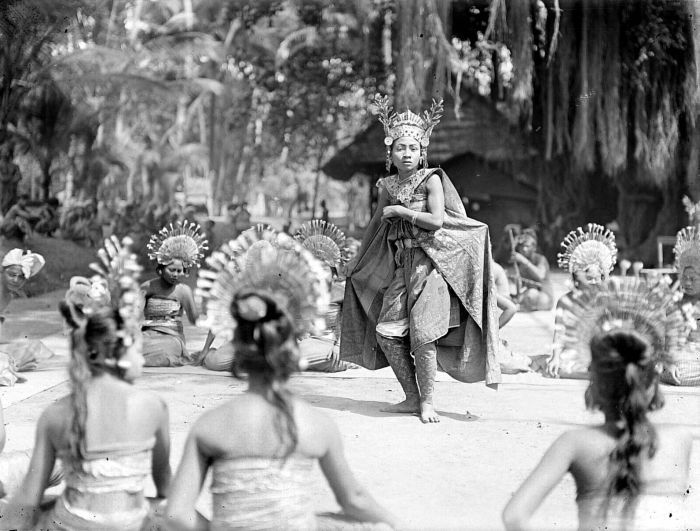 Negatief. Balinese danseressen dansen de djangèr